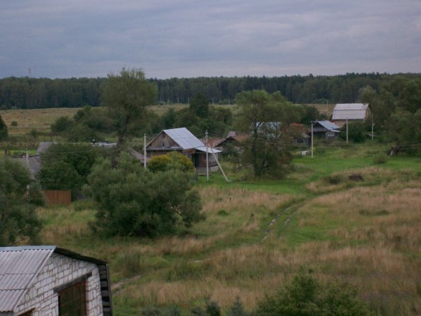 Вид на д. Паткино с высокой ели